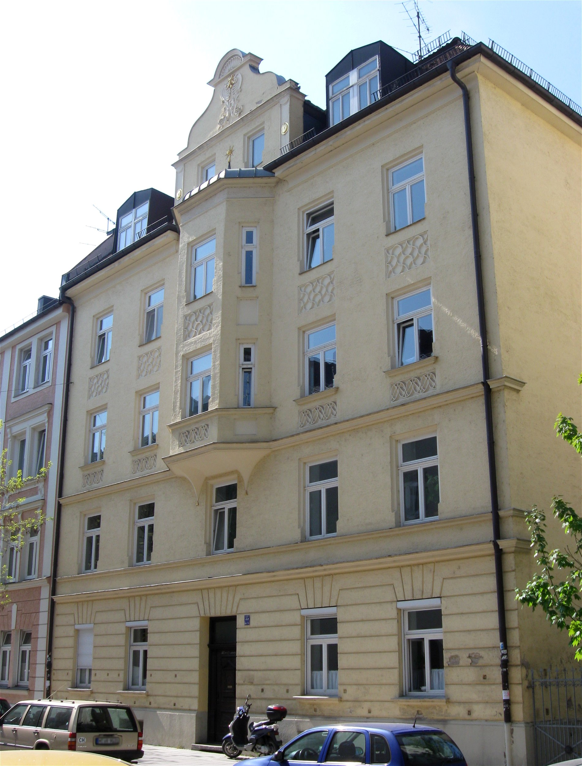 Metzstraße 35; Mietshaus, deutsche Renaissance, mit Mittelerker und -giebel sowie Maßwerkdekor, um 1900